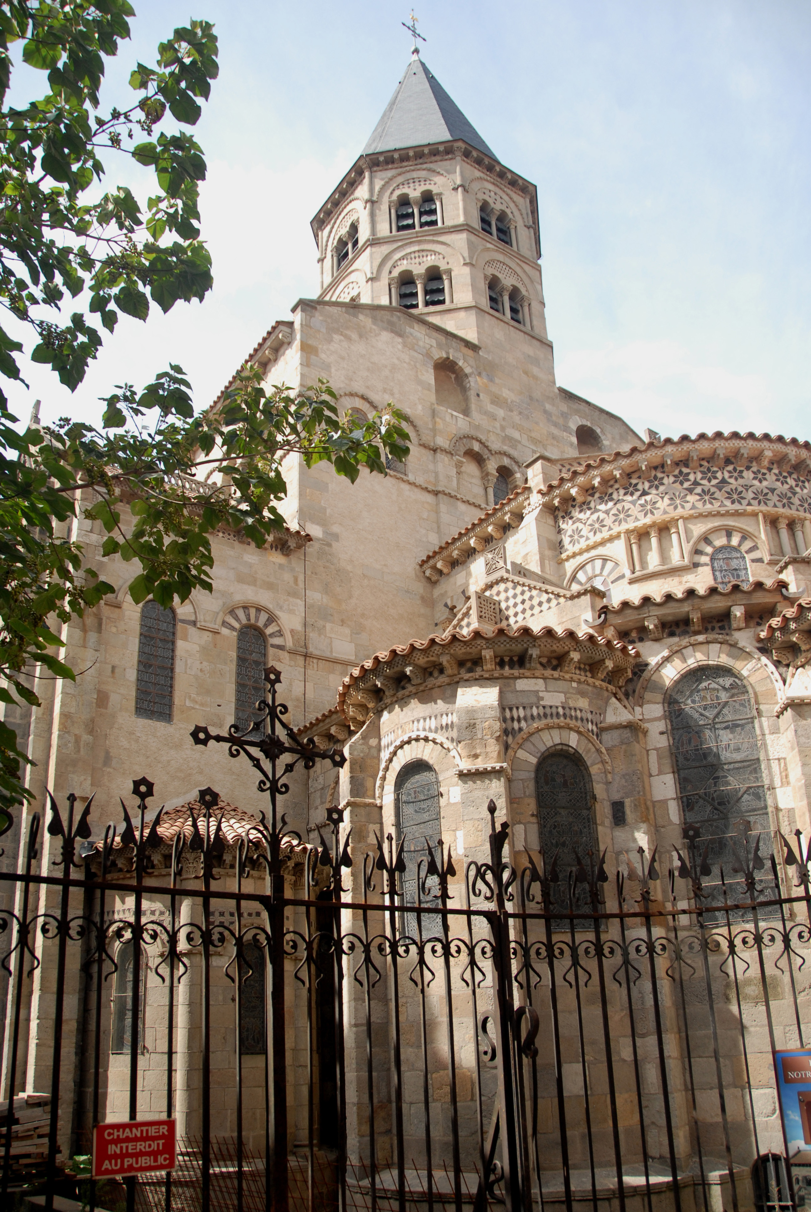 Notre-Dame du Port, Chothaupt von SO